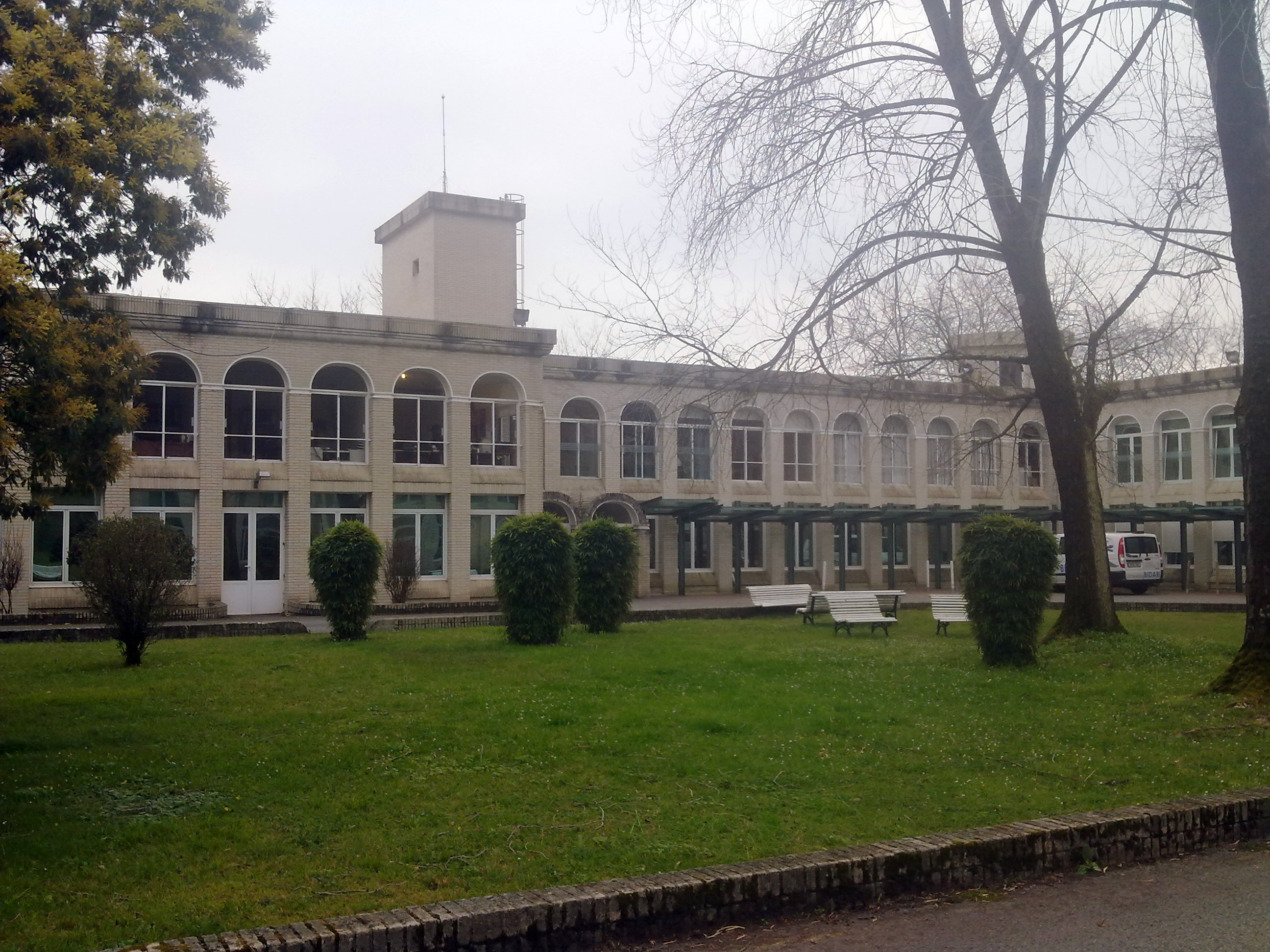 Donostiako ASPACE